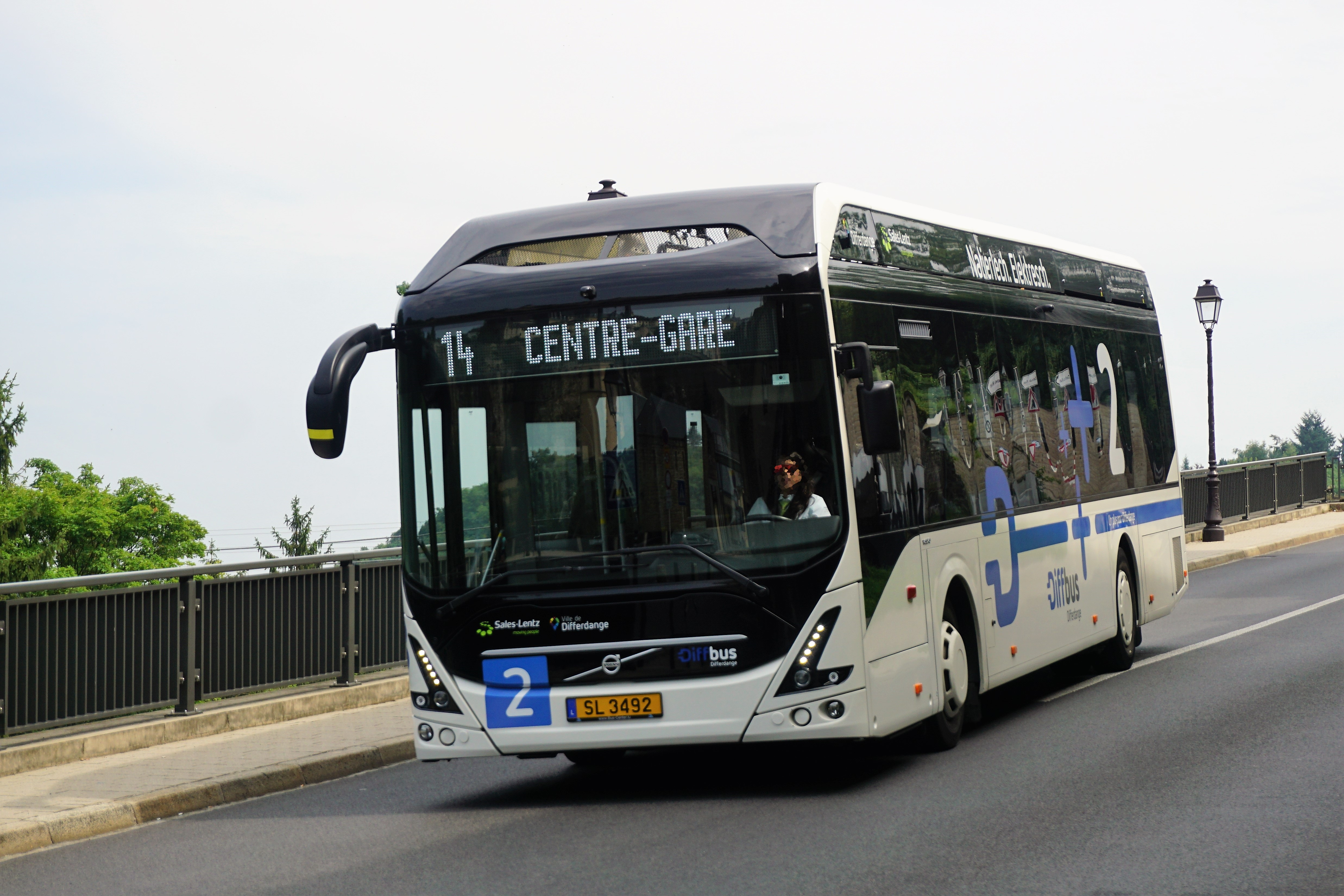 Un bus « Volvo 7900 Electric » dans la descente de la rue de Trèves. Le véhicule - normalement en service sur le réseau « Diffbus » (Ville de Differdange) - est en essai sur la ligne AVL 14.